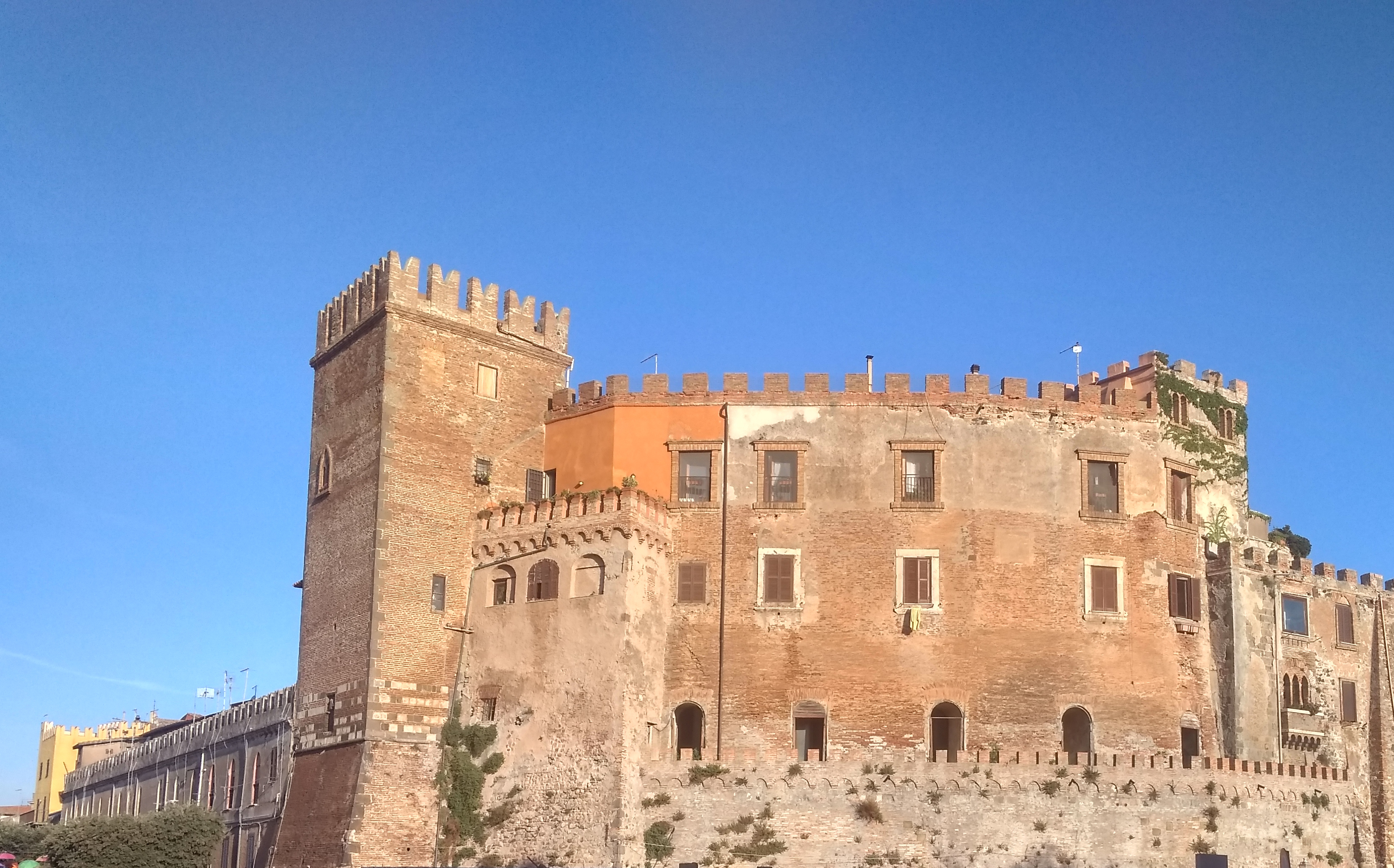 Castello Guglielmi a Montalto di Castro, Lazio, Italia